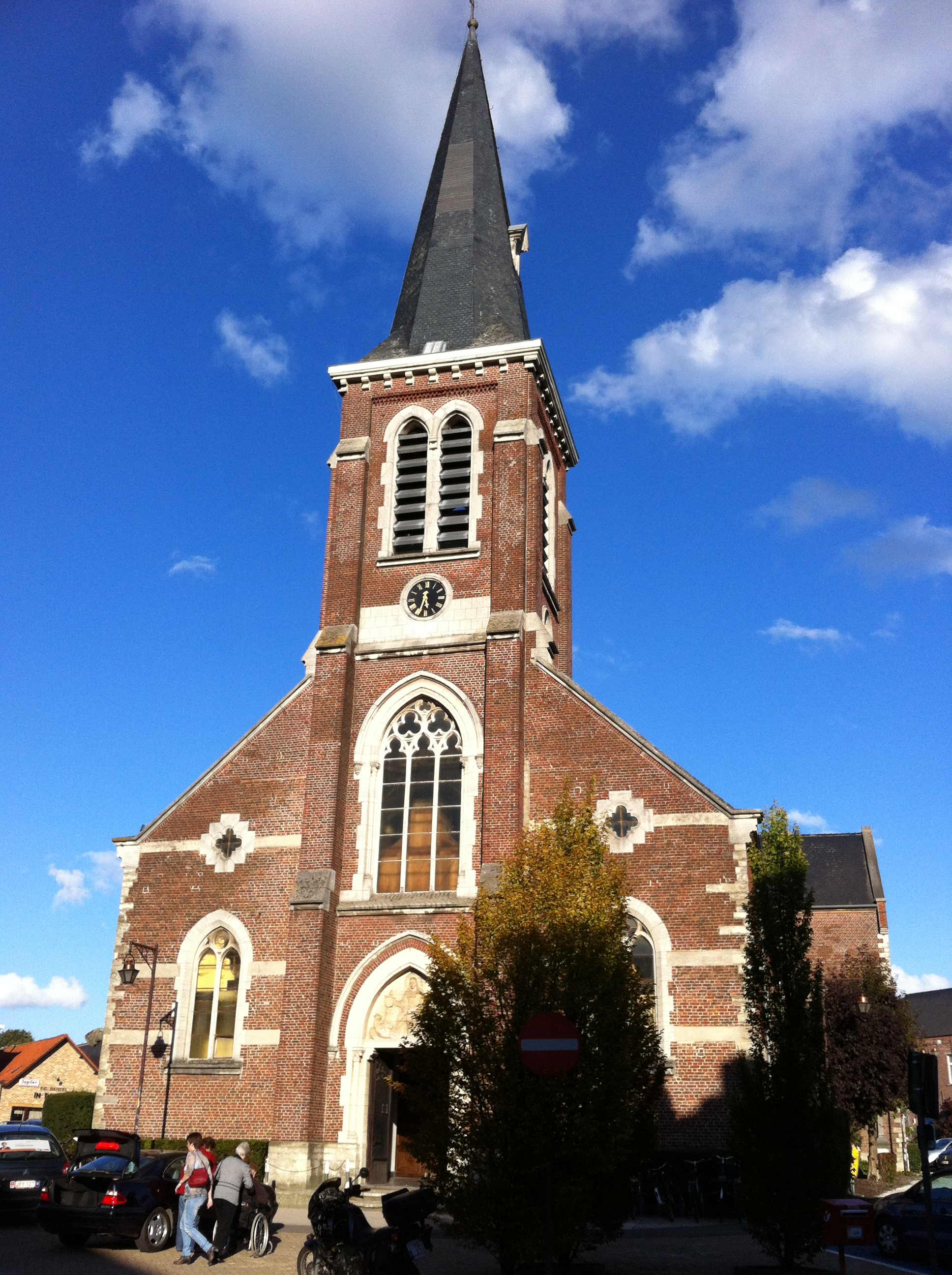 Parochiekerk Sint-Catharina - Kerkstraat Ternat